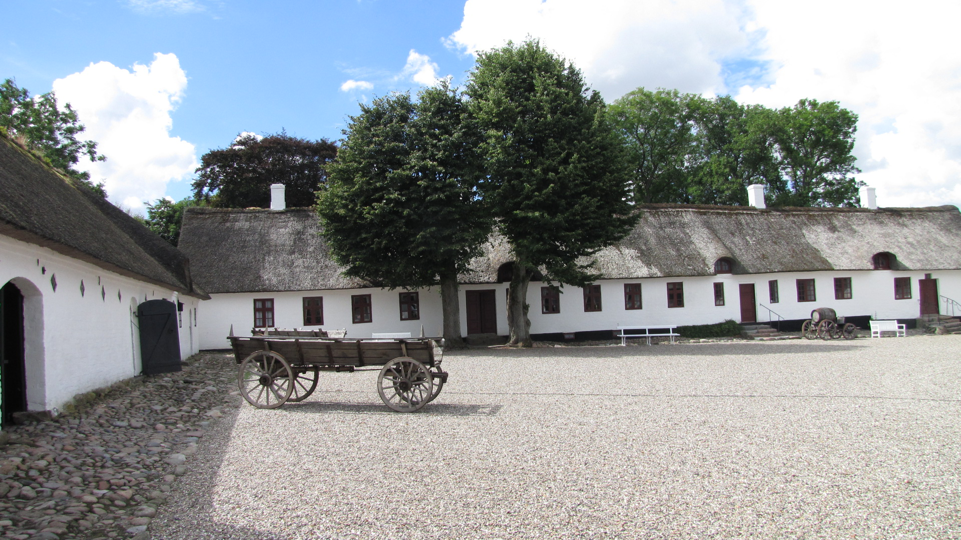 Hessel